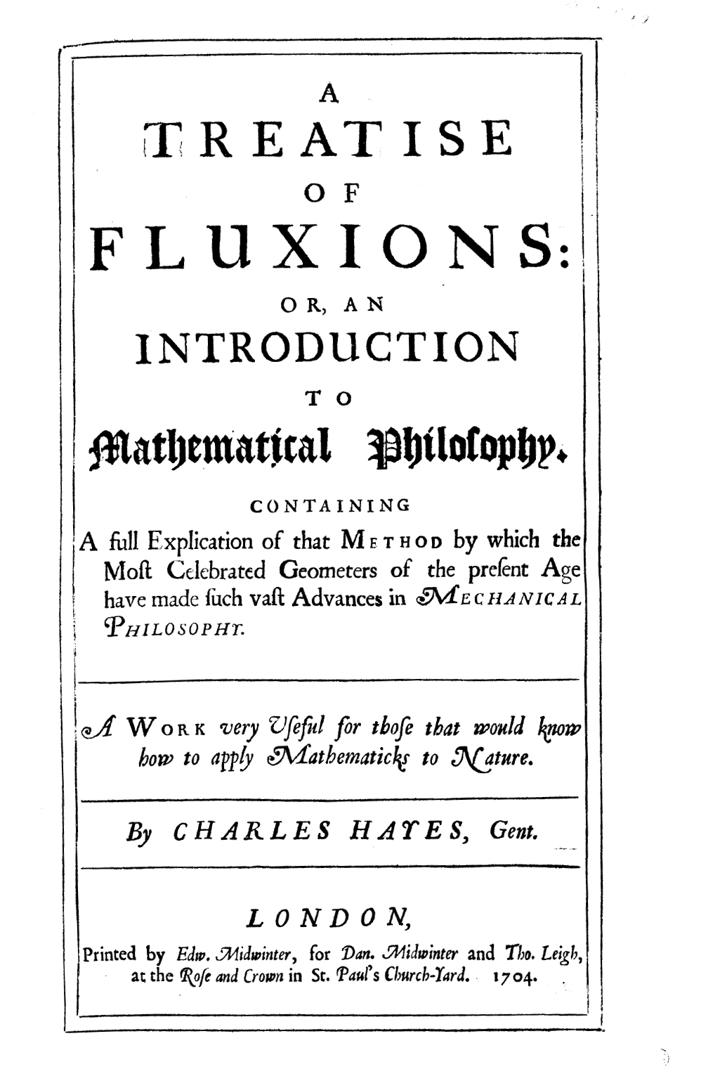 A treatise of fluxions or, an Introduction to mathematical philosophy. Containing a full explication of that method by which the most celebrated geometers of the present age have made such vast advances in mechanical philosophy. A work very useful for those that would know how to apply mathematicks to nature. By Charles Hayes .... - London : printed by Edw. Midwinter for Dan. Midwinter and Tho. Leigh, 1704. - [16], XII, [12], 315, [1] p. : ill. ; 2° .